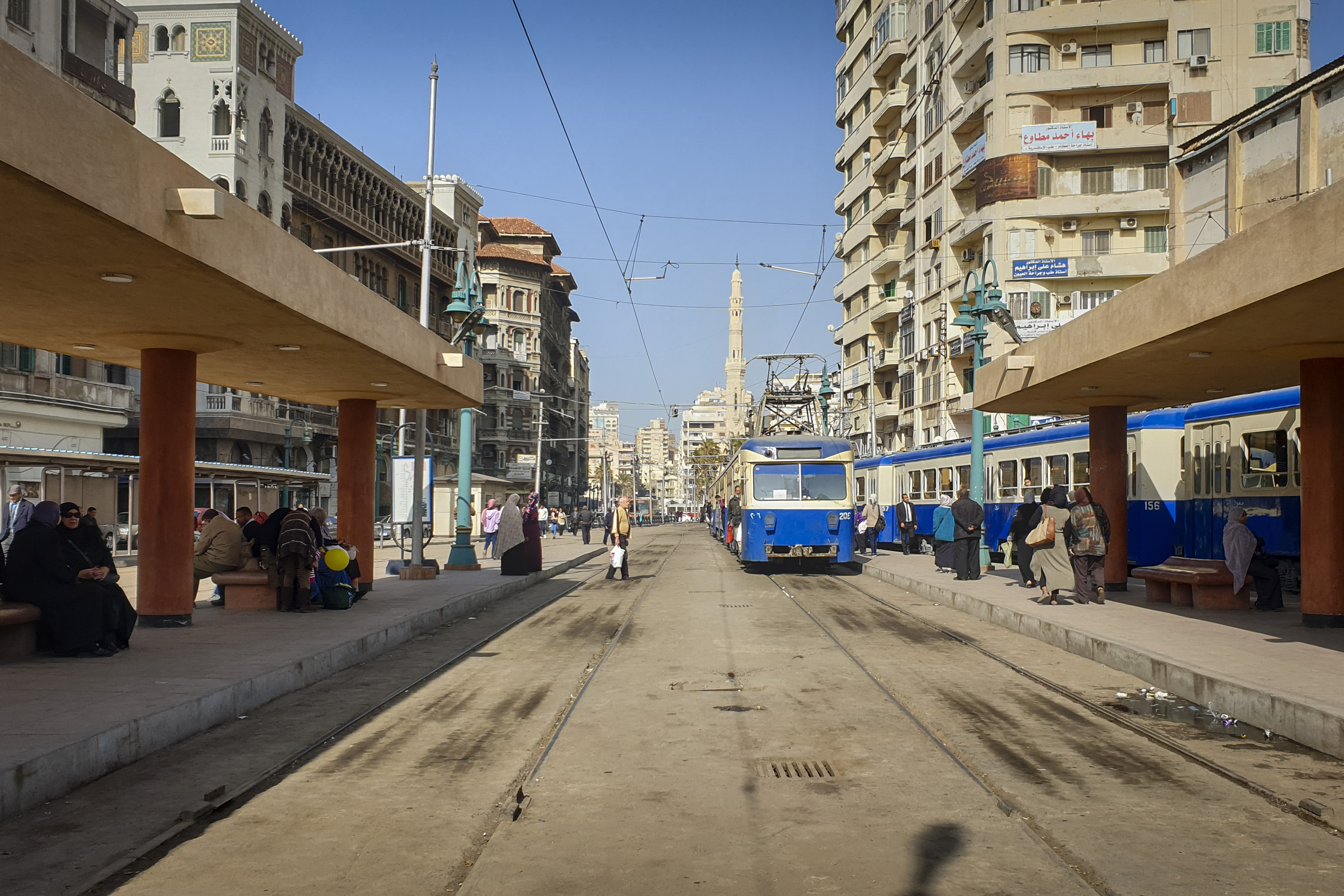 مصرى: في 1863 بدأ استخدام الترام في السكندرية و ظل طوال هذا الوقت يخدم المقيمين في المدينة. في الصورة منظر للترام الأزرق - ترام الرمل- في محطته الرئيسية في محطة الرمل This is an image with the theme "Africa on the Move or Transport" from: Egypt